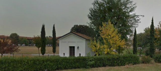 Chiesa della Madonna del Salvatore a Vittuone (MI)